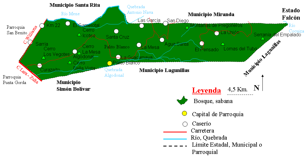 Caseríos de la Parroquia Arístides Calvani, Municipio Cabimas, Zulia, Venezuela